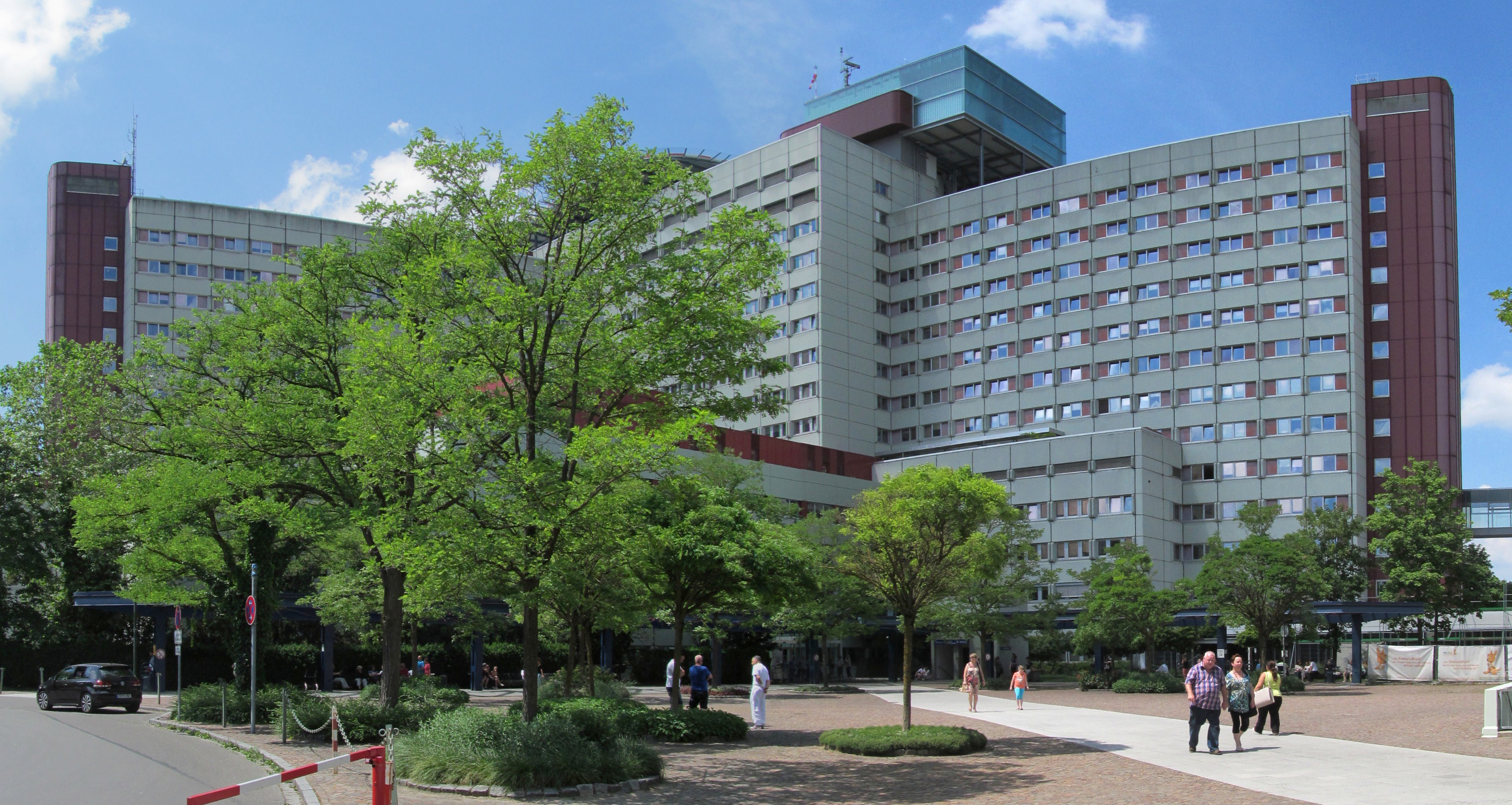 Haupteingang des Klinikum Augsburg.